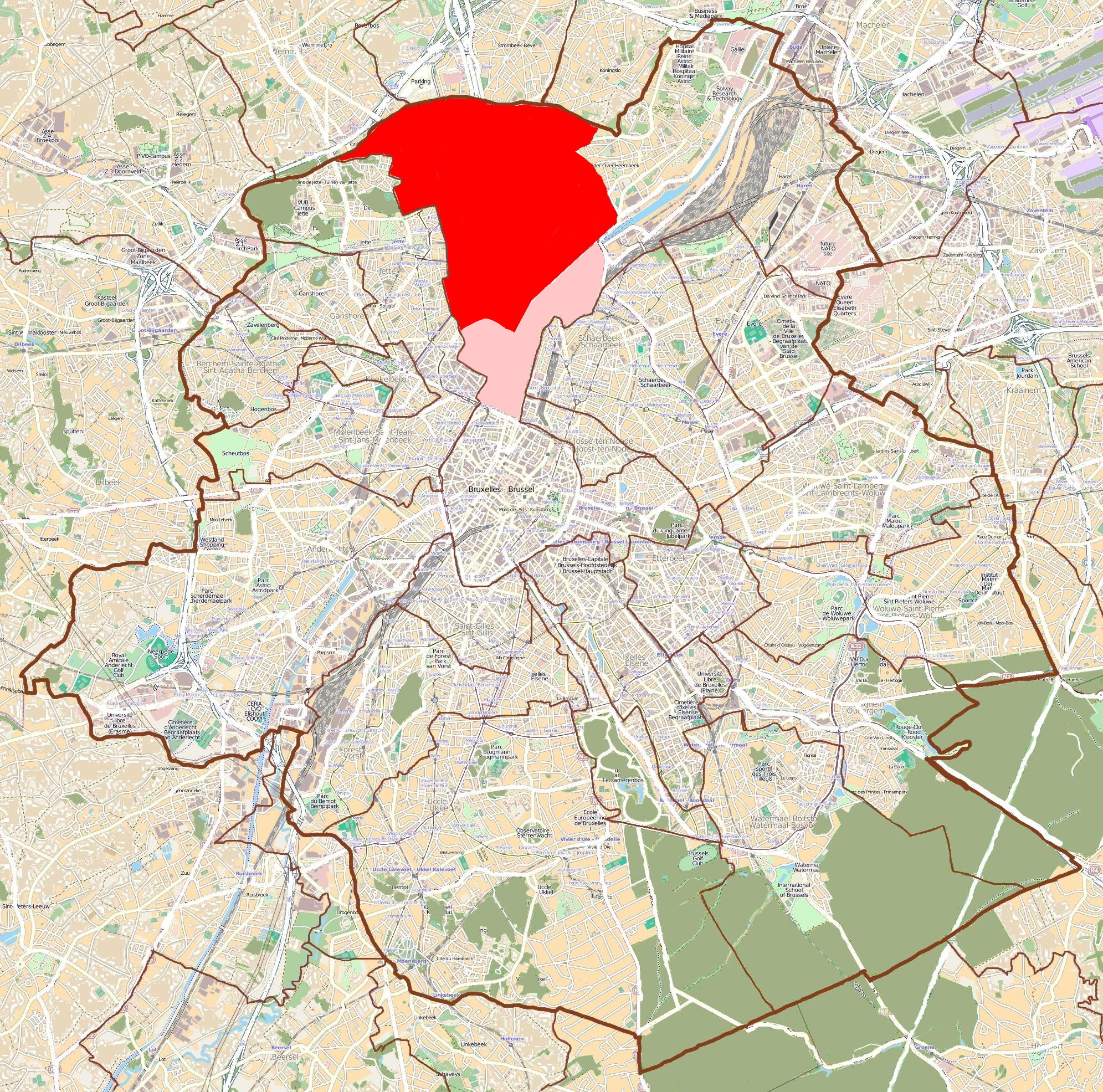 Carte de Laeken. En rouge la zone postal 1020-Laeken actuel. En rose quartier section de l'ancienne commune ne faisant plus partie de la zone postal 1020